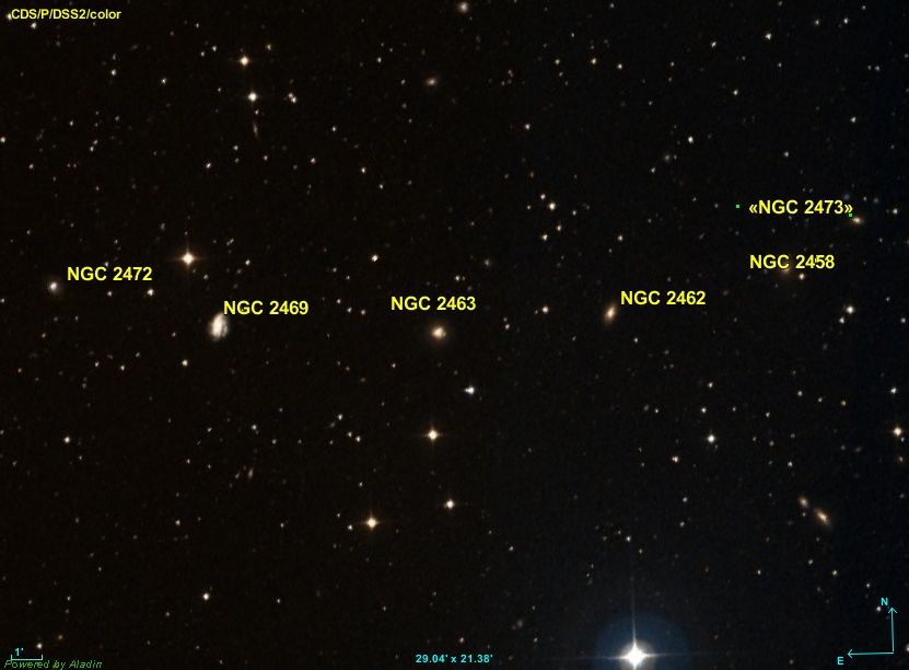 Image créée à l'aide du logiciel Aladin Sky Atlas du Centre de Données astronomiques de Strasbourg et des données publiques en format FIT de DSS (Digitized Sky Survey).